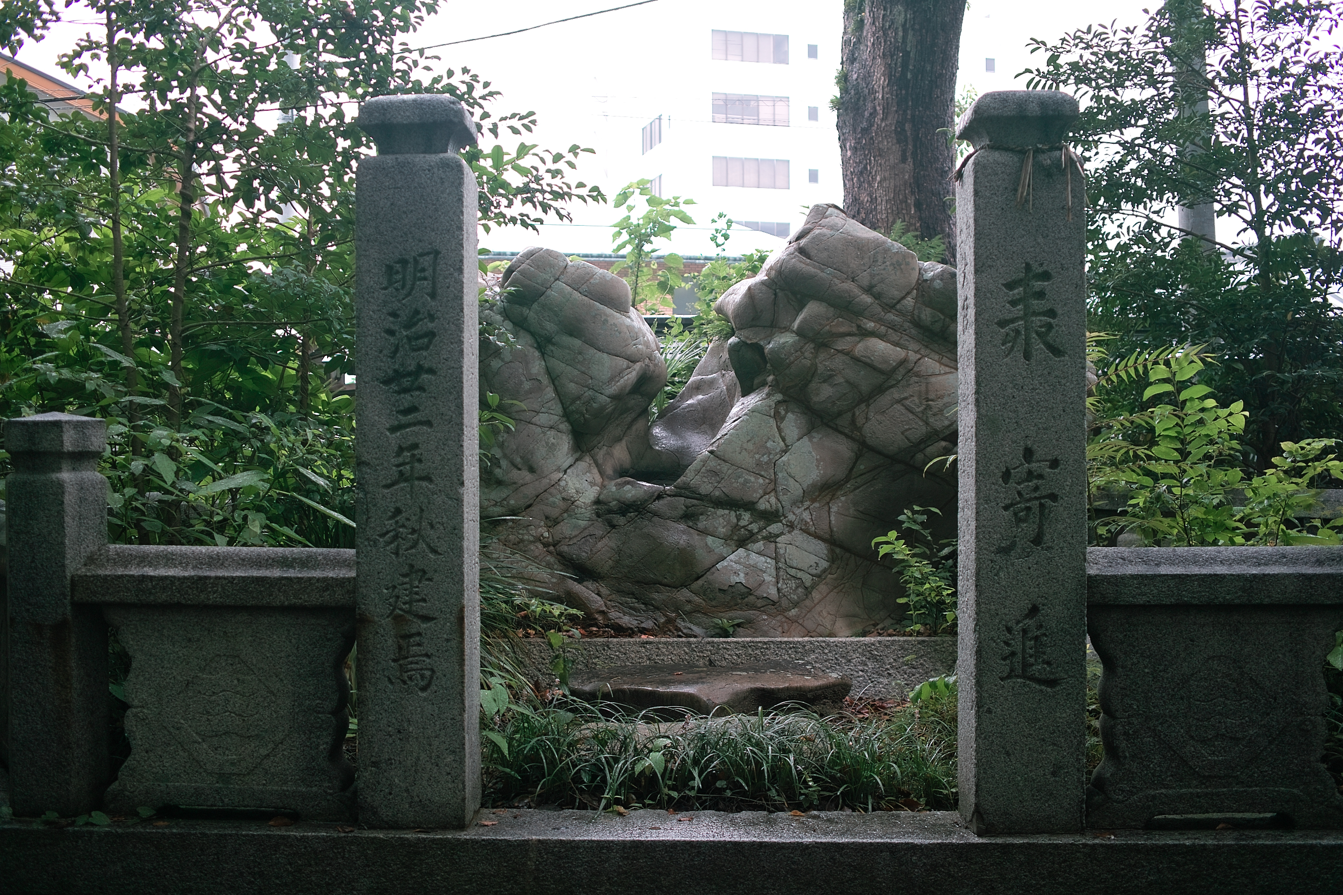 龍 宝 石